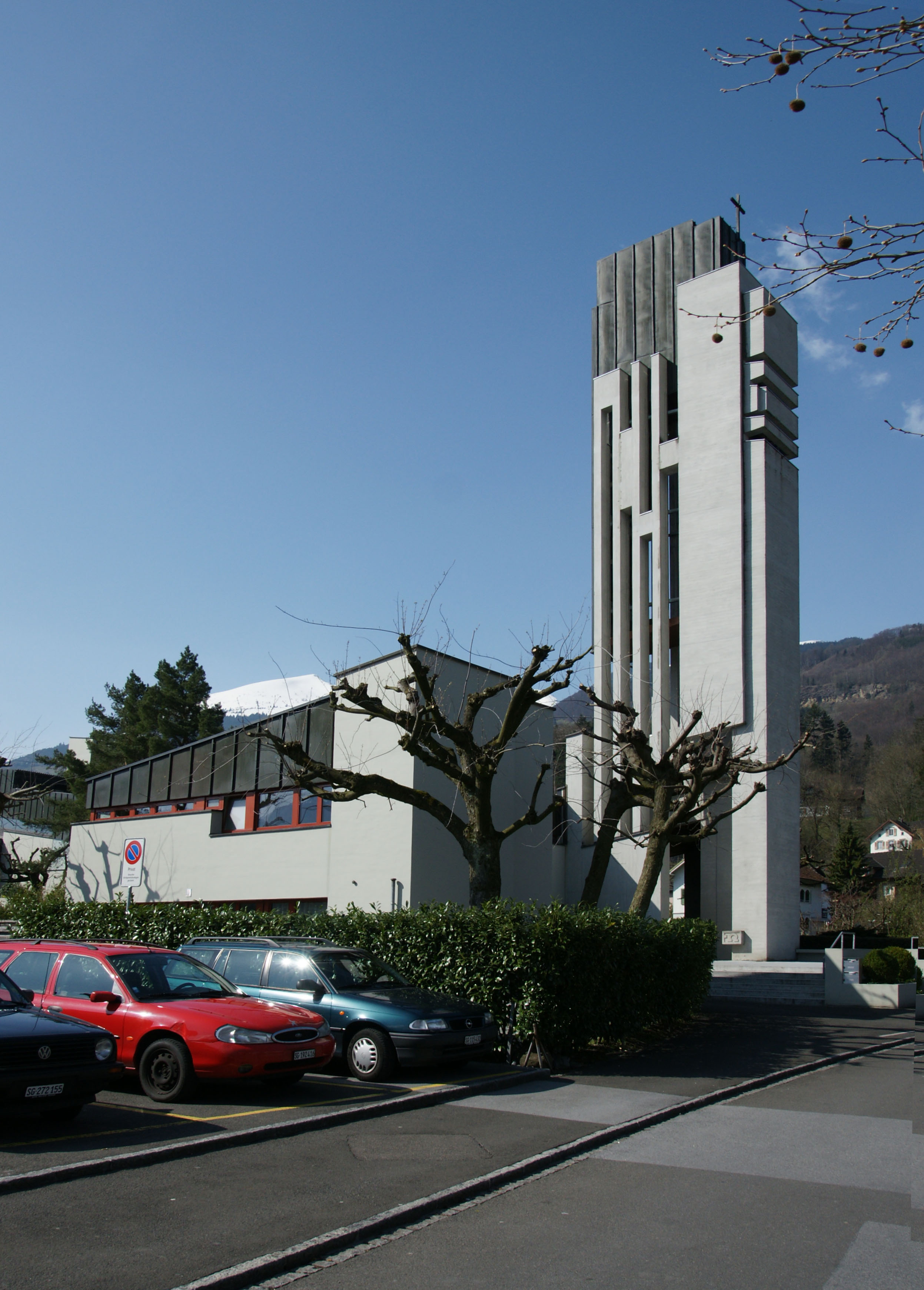 Buchs SG. Kath. Kirche Herz Jesu. Neubau 1964-65